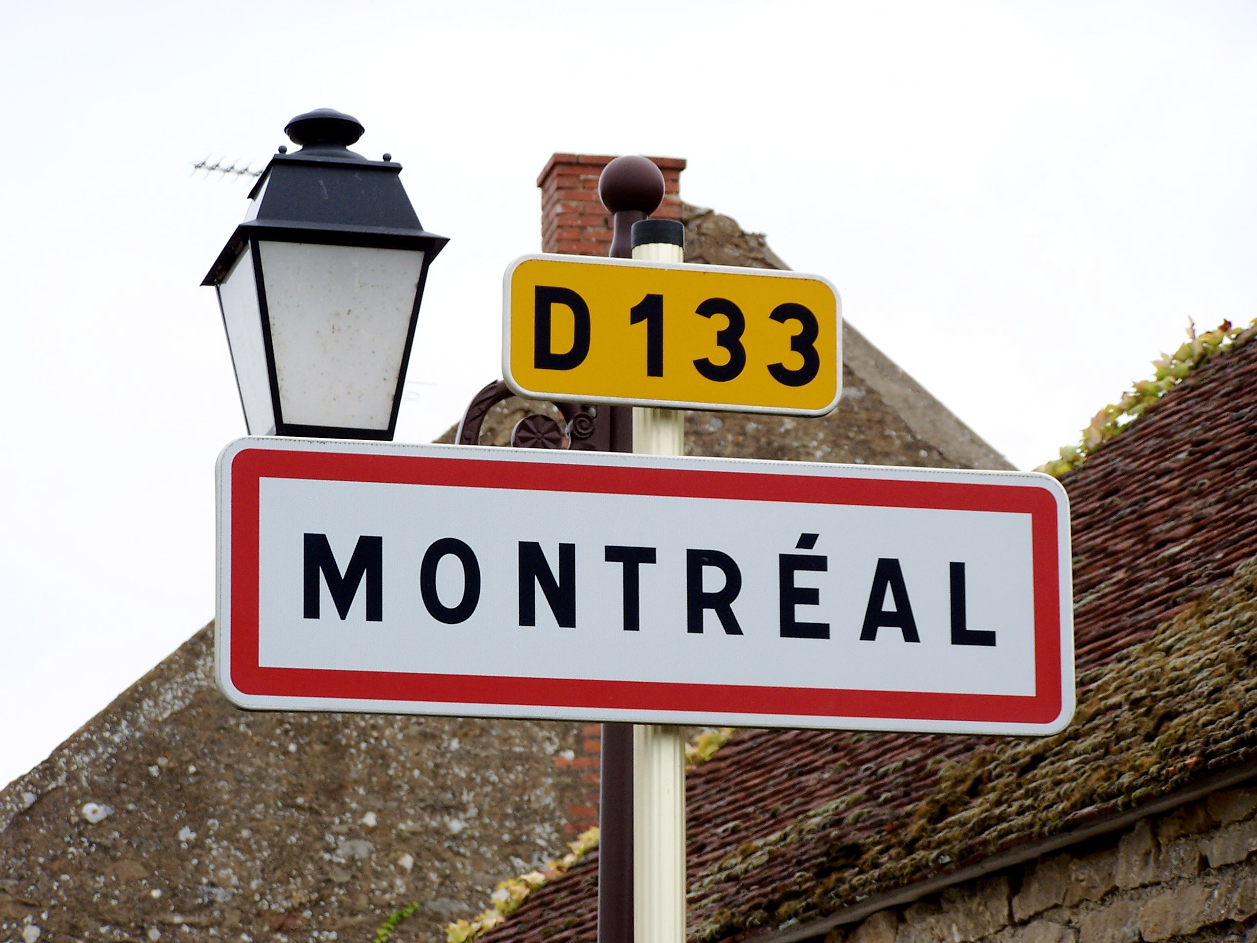 Montréal dans l'Yonne Août 2006